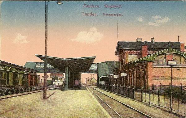 Tondern 1918 mit Bahnsteigüberführung